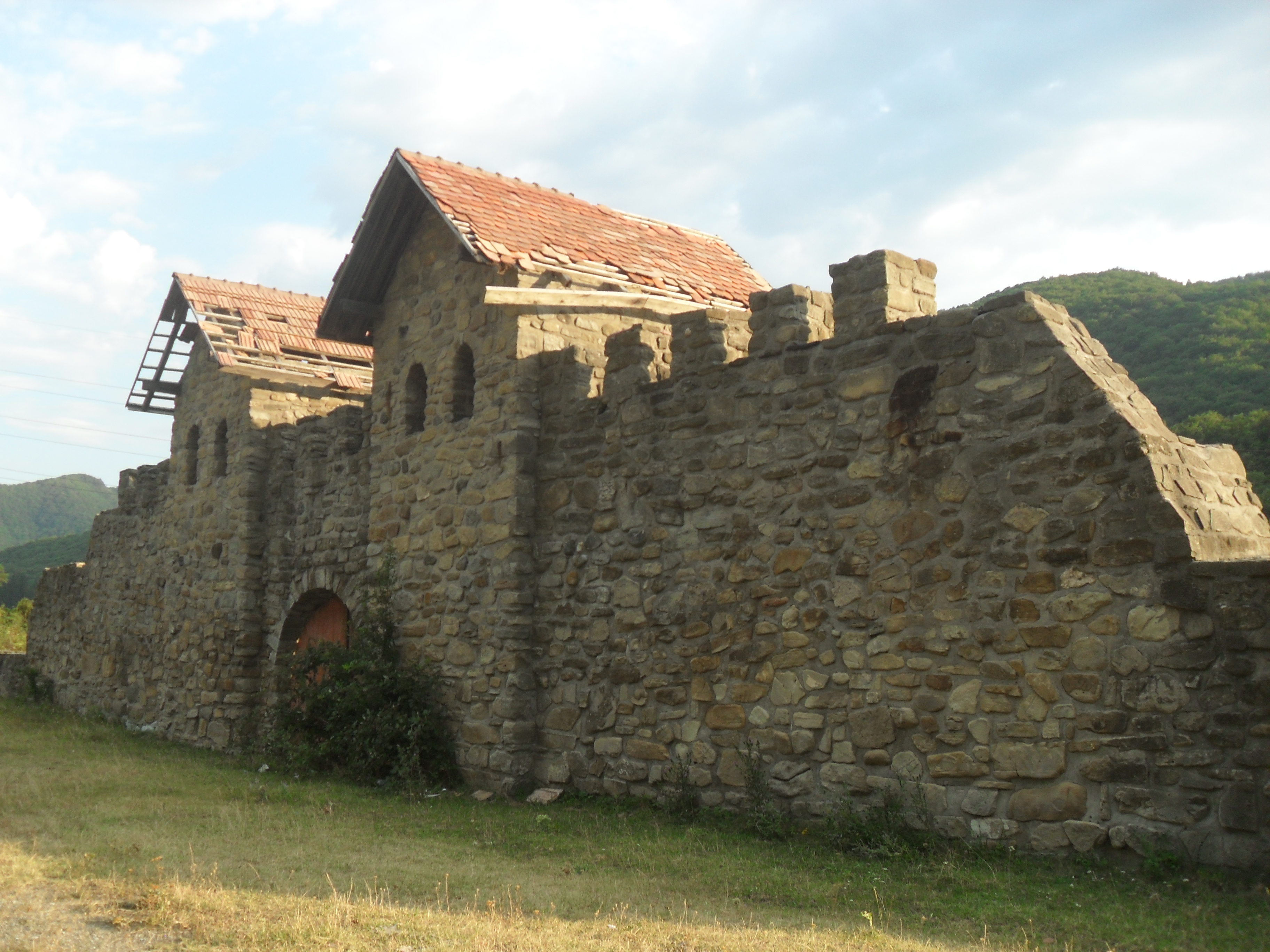 Castrul roman Arutela este un monument istoric, situat între localitățile Păușa și Căciulata, în punctul „Poiana Bivolari”, lângă orașul Călimănești, fiind trecut în lista monumentelor istorice din 2004 datând din epoca romană anii 137–138 d.C.